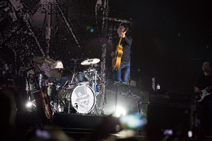 20130710-ByanAdamsLucca-0046